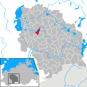 Barnin in Mecklenburg-Vorpommern - District Parchim